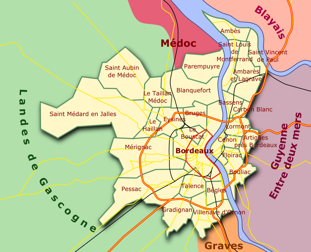 Carte de la Communauté Urbaine de Bordeaux, Aquitaine, France